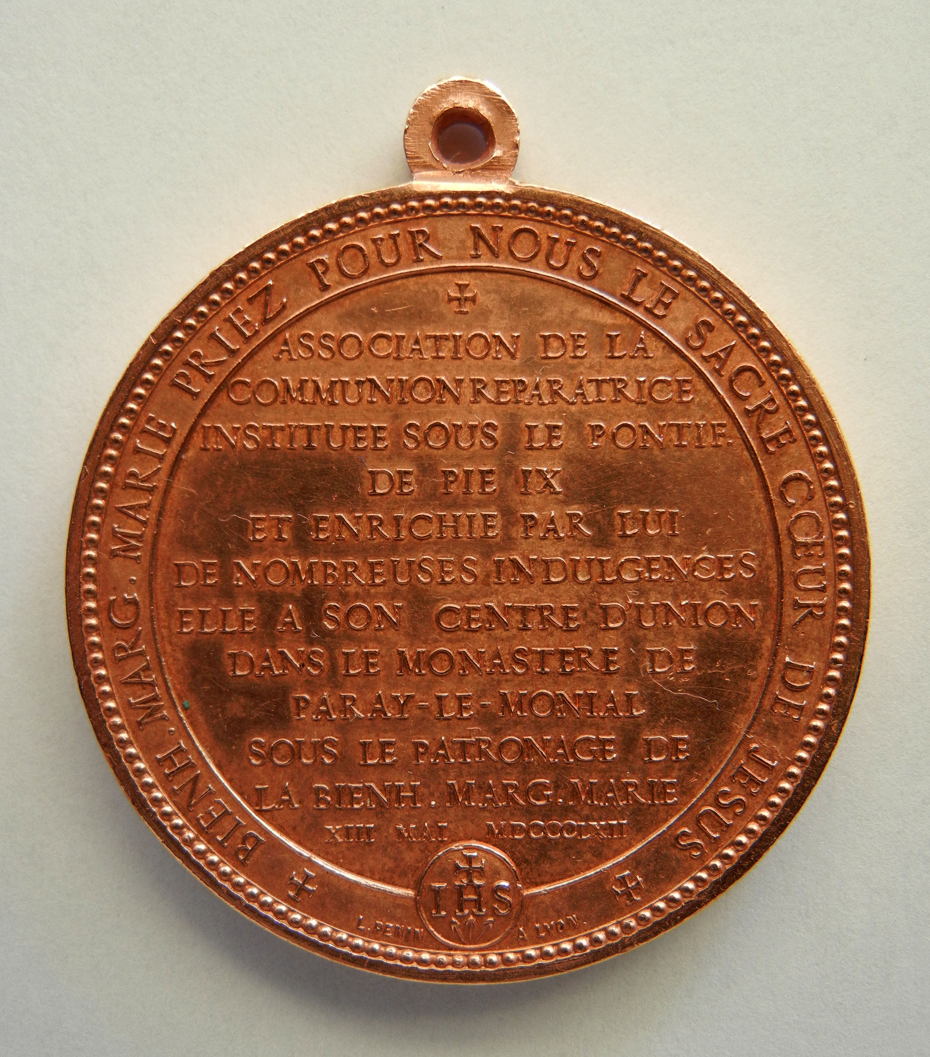 Médaille (revers) éditée le 13 mai 1862 lorsque Pie IX déclara "Bienheureuse" Marguerite-Marie ALACOQUE (1647 – 1690) Inhumée au monastère de Paray-le-Monial. Elle fut Canonisée en 1920. Graveur : Ludovic PENIN à Lyon (1830 - 1868). Médaille en cuivre. Diamètre : 40 mm. Poids : 30 grs